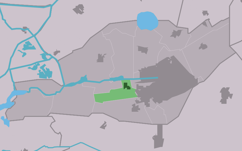 Kaartsje fan himrik fan De Wylgen